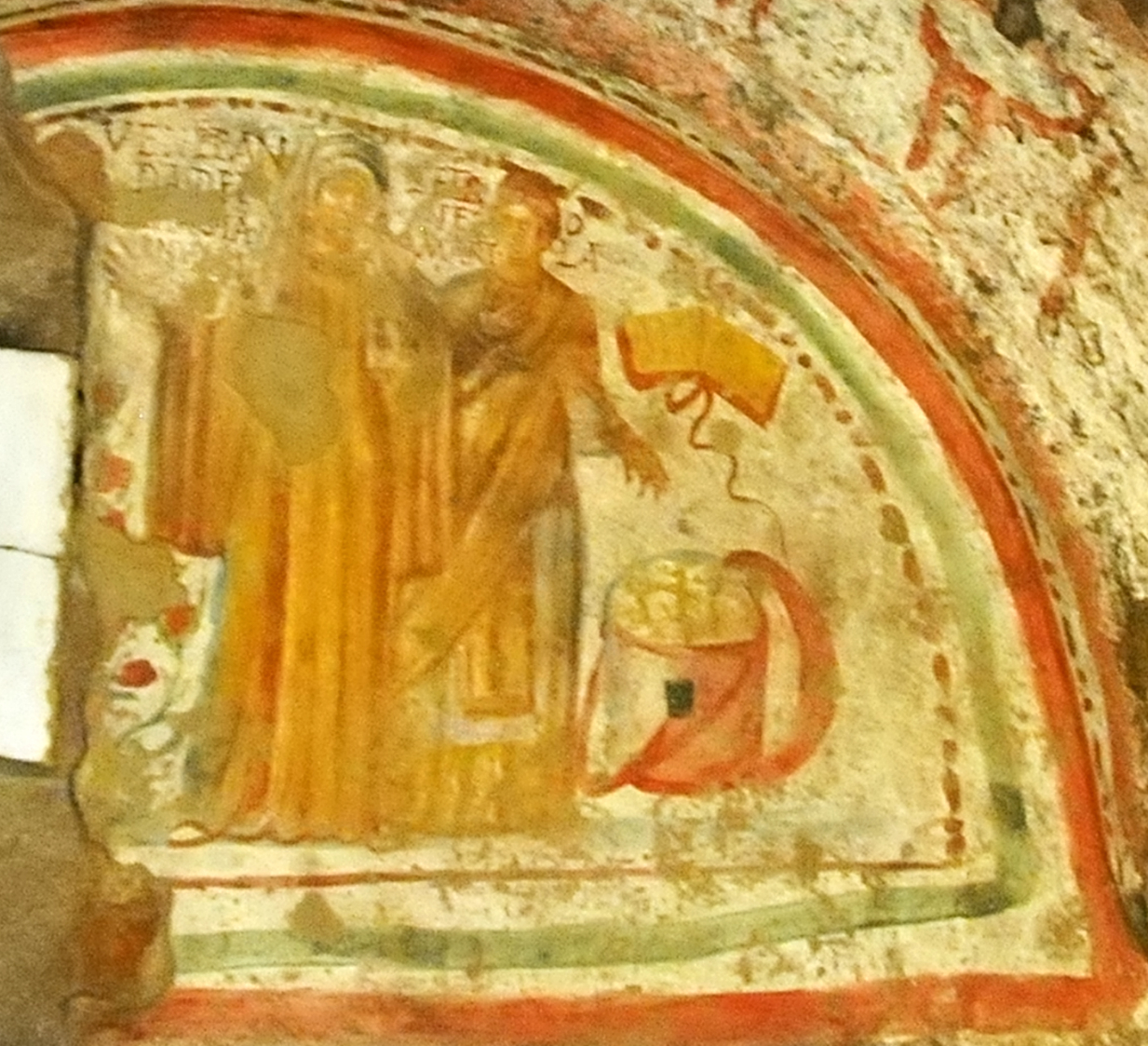 Veneranda e Santa Petronilla